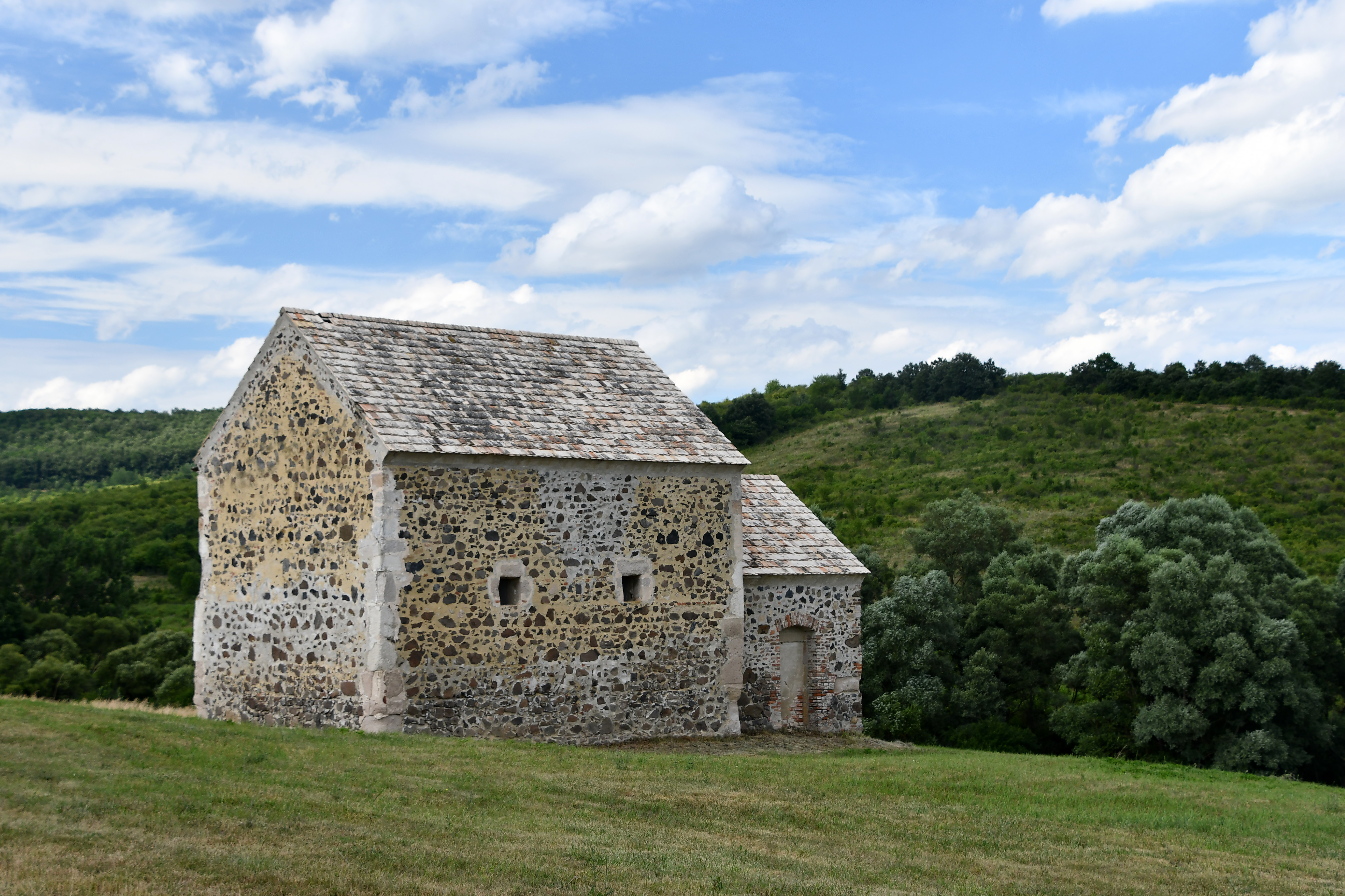 A herencsényi harasztipusztai templom délnyugat felől